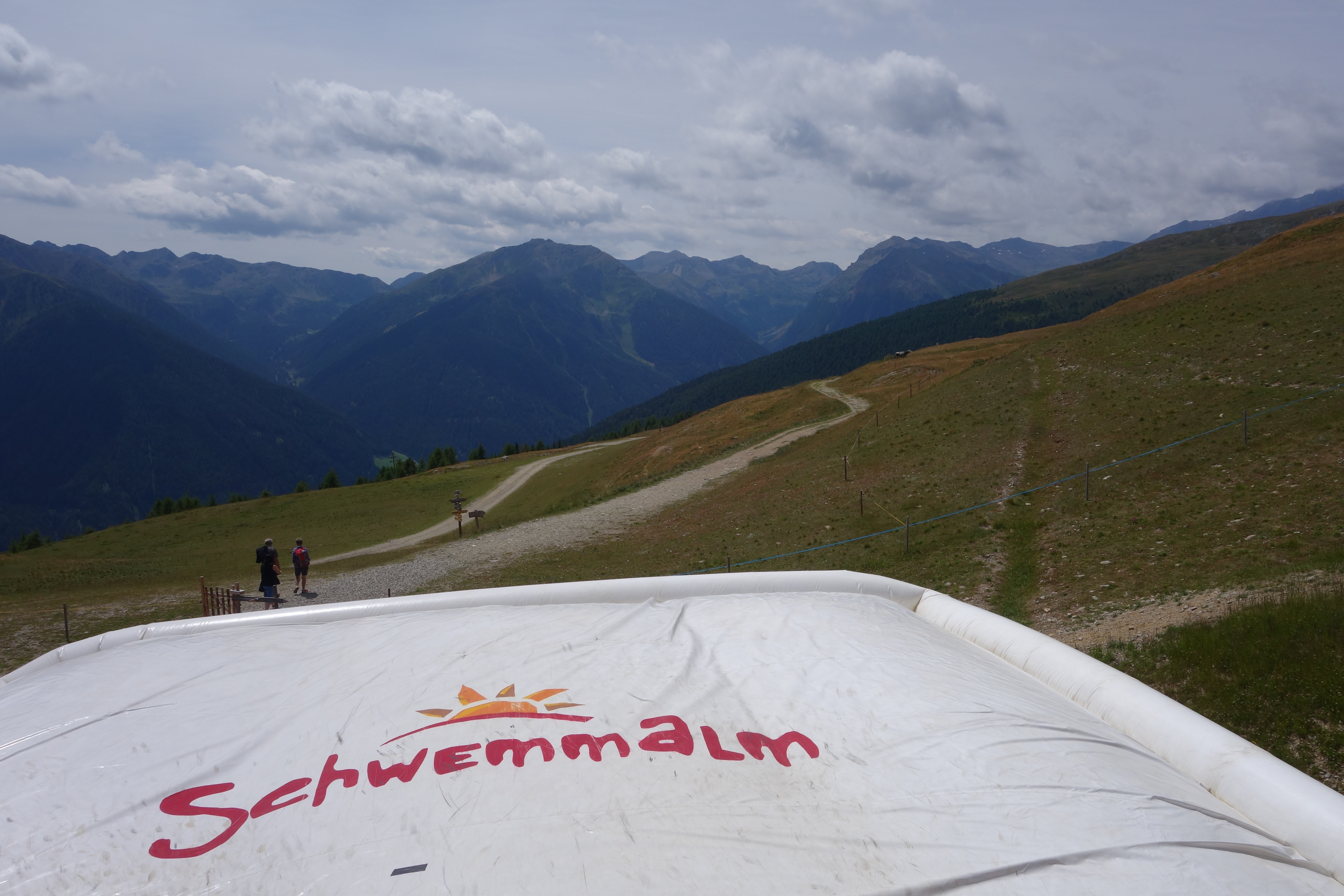 Schwemmalm im Sommer. Blick von der Bergstation